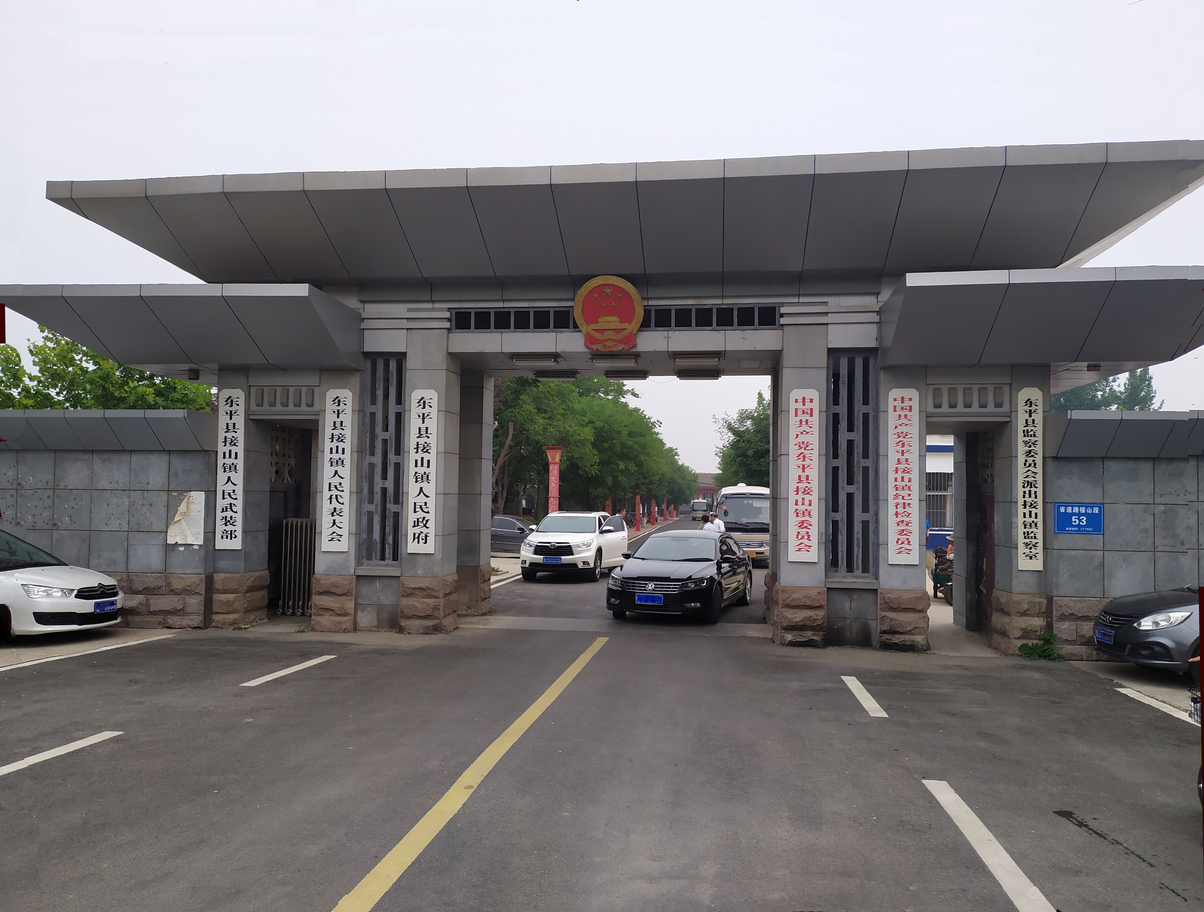 中文（中国大陆）: 接山镇人民政府和中共接山镇党委所在地